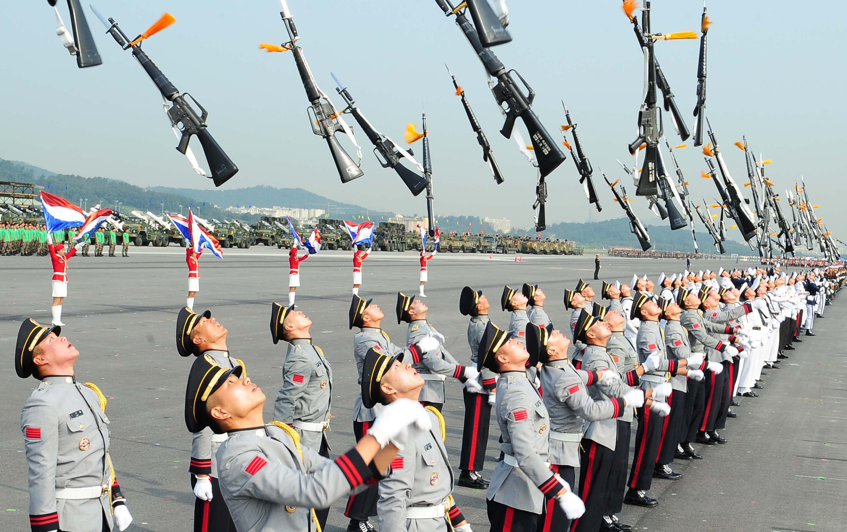 촬영 - 이헌구 기자